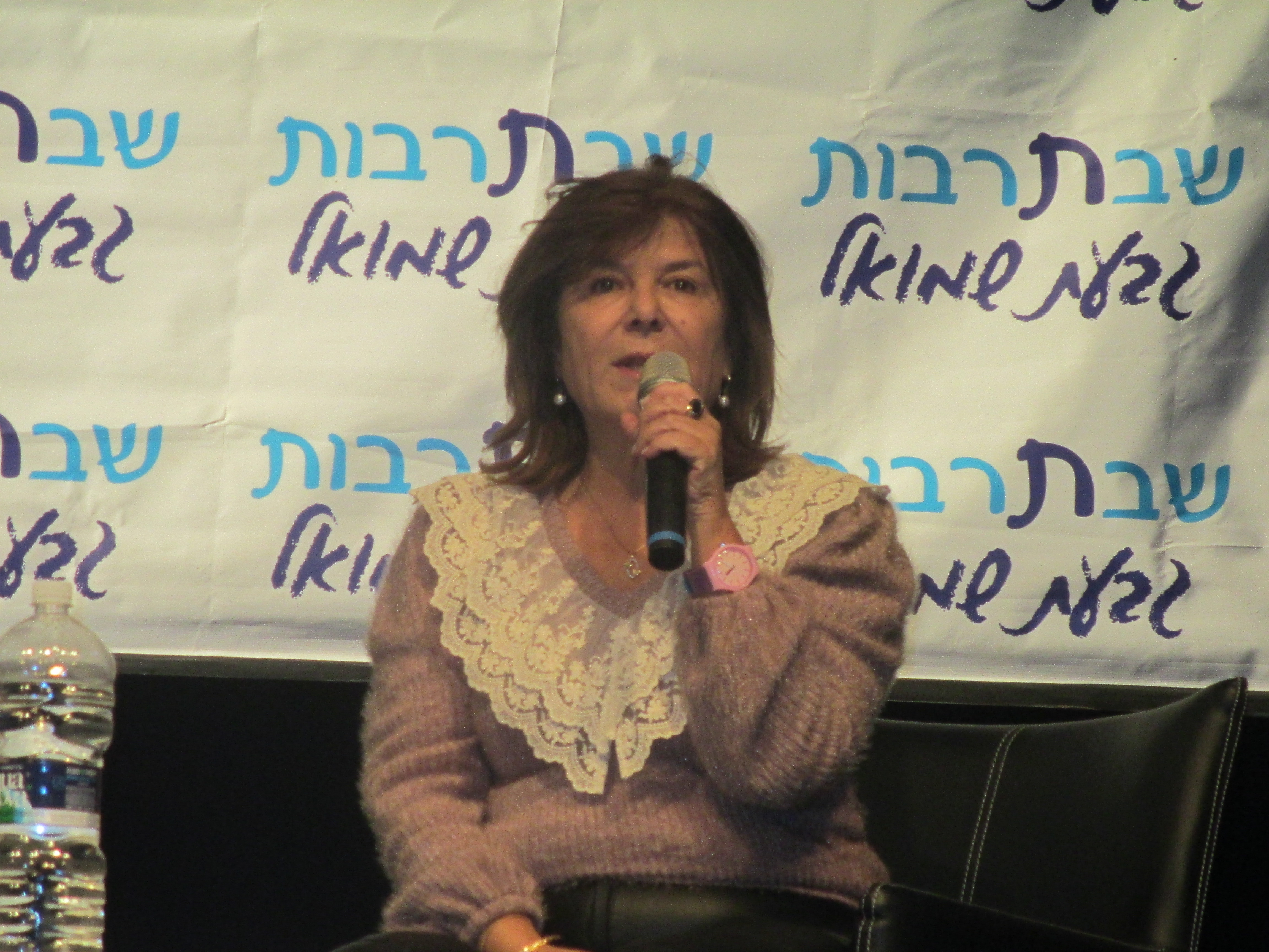 רינה מצליח באירוע שבתרבות בגבעת שמואל